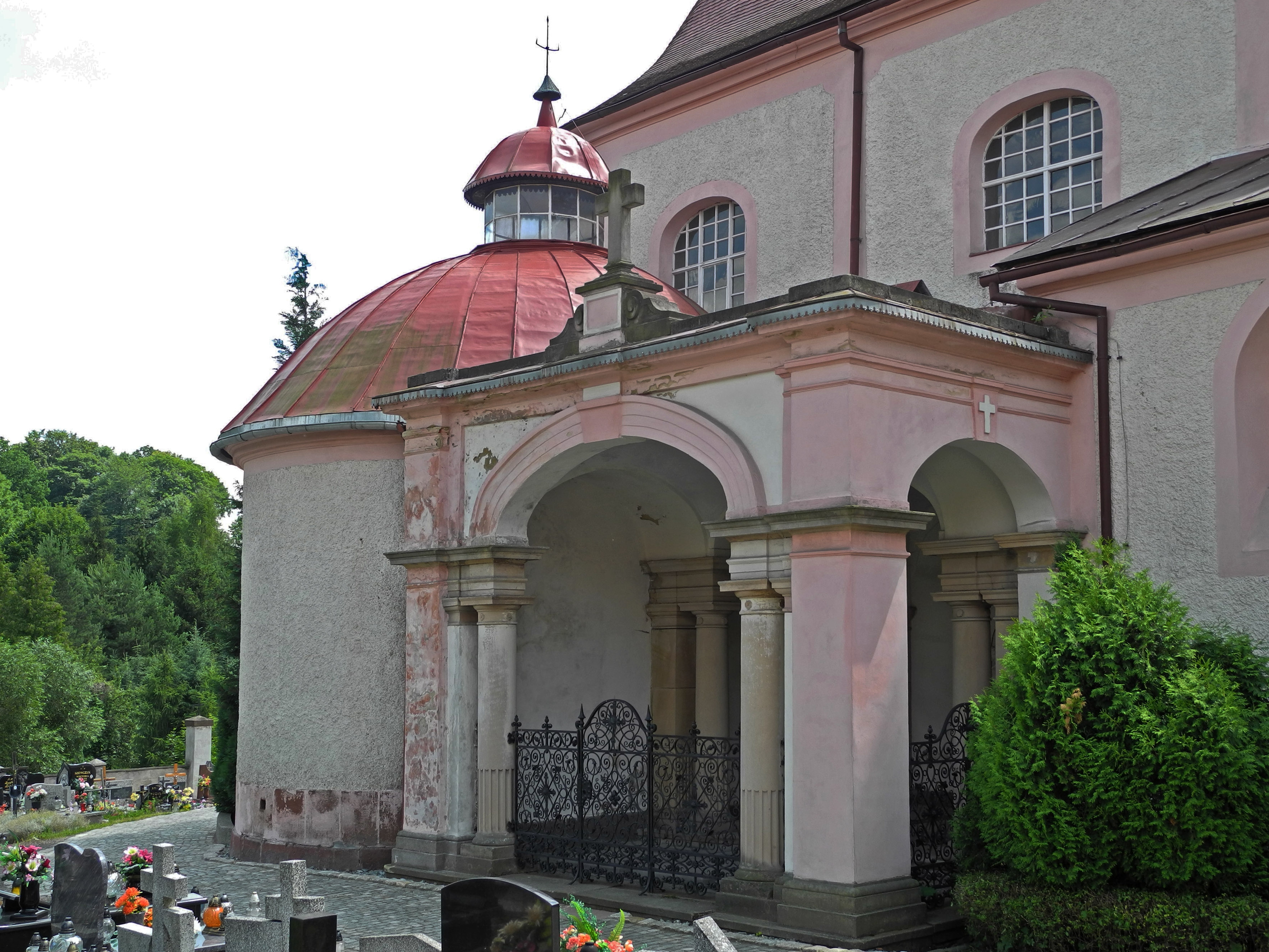 Grabkapelle der Grafen von Magnis in Eckersdorf (Bożków) in Niederschlesien